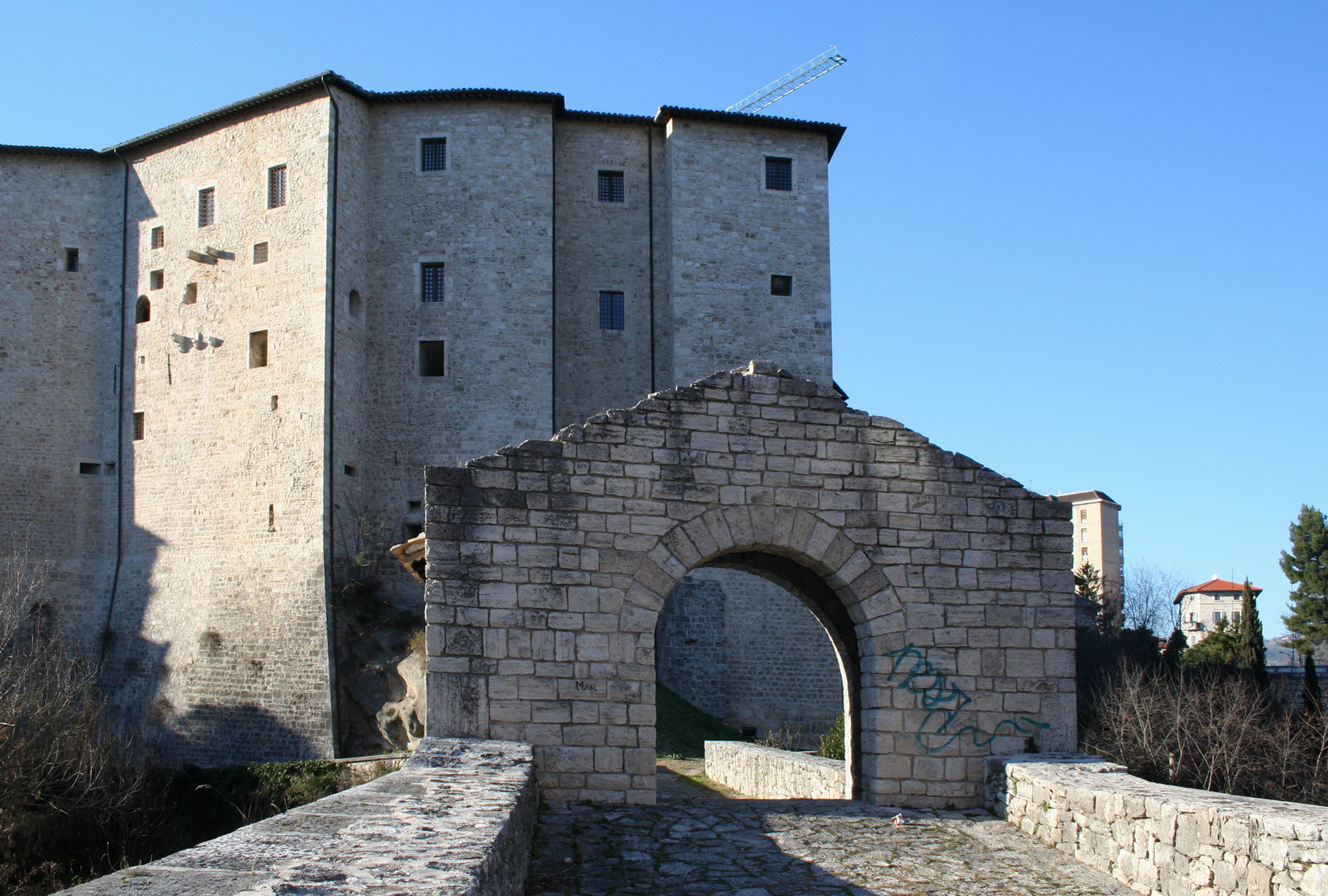 Forte Malatesta veduta dal Ponte di Cecco, Ascoli Piceno, esterno giorno, proprio scatto Sibilla.io "Utilizzo concesso" Ticket#2007040410014627 (ticket per le immagini) This file is licensed under Creative Commons 3.0 license